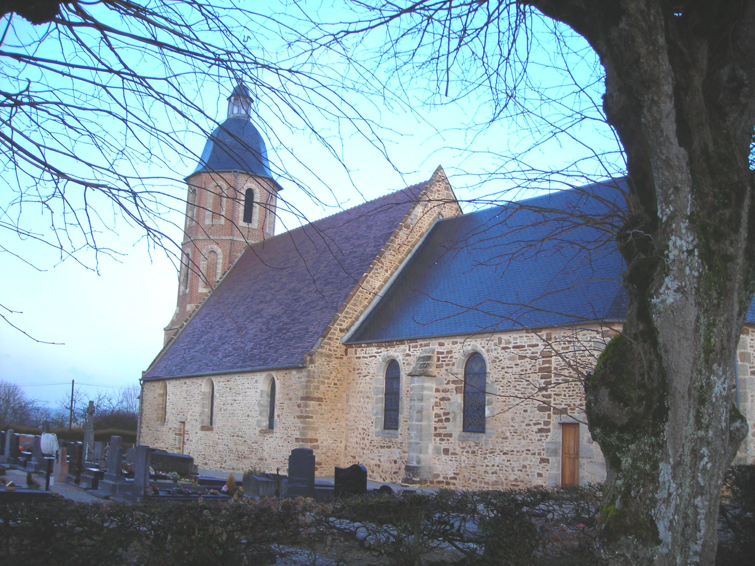 Eglise Saint-Georges à Orgères (Orne,France)